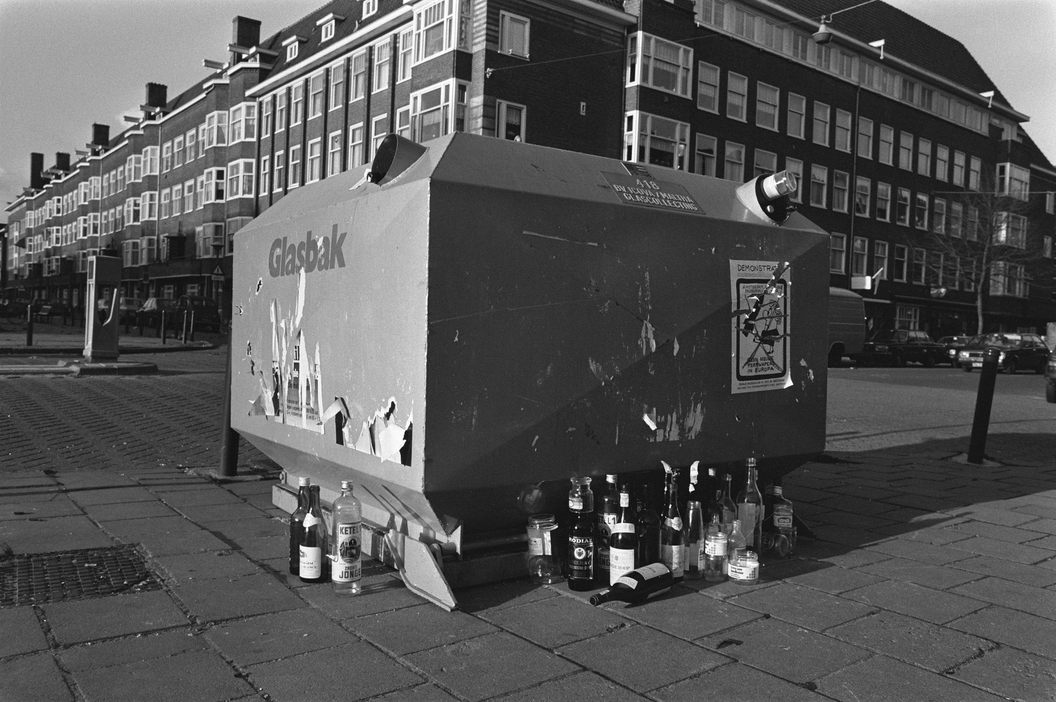 Collectie / Archief : Fotocollectie Anefo Reportage / Serie : [ onbekend ] Beschrijving : Overvolle glascontainer met flessen ernaast Datum : 24 november 1981 Trefwoorden : containers, flessen, glas Fotograaf : Antonisse, Marcel / Anefo Auteursrechthebbende : Nationaal Archief Materiaalsoort : Negatief (zwart/wit) Nummer archiefinventaris : bekijk toegang 2.24.01.05 Bestanddeelnummer : 931-8224